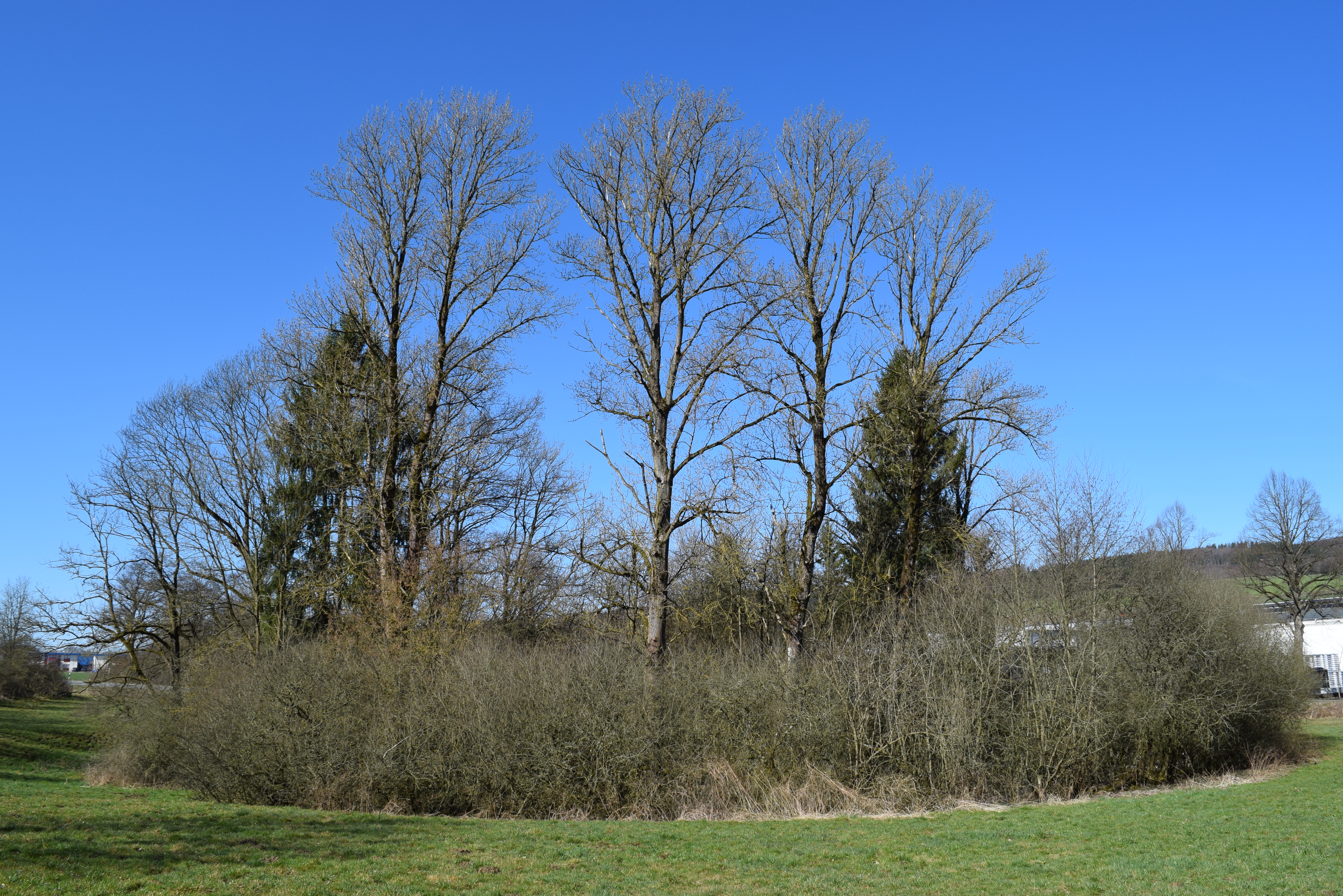 Gesamtansicht der Wasserburg Gevern